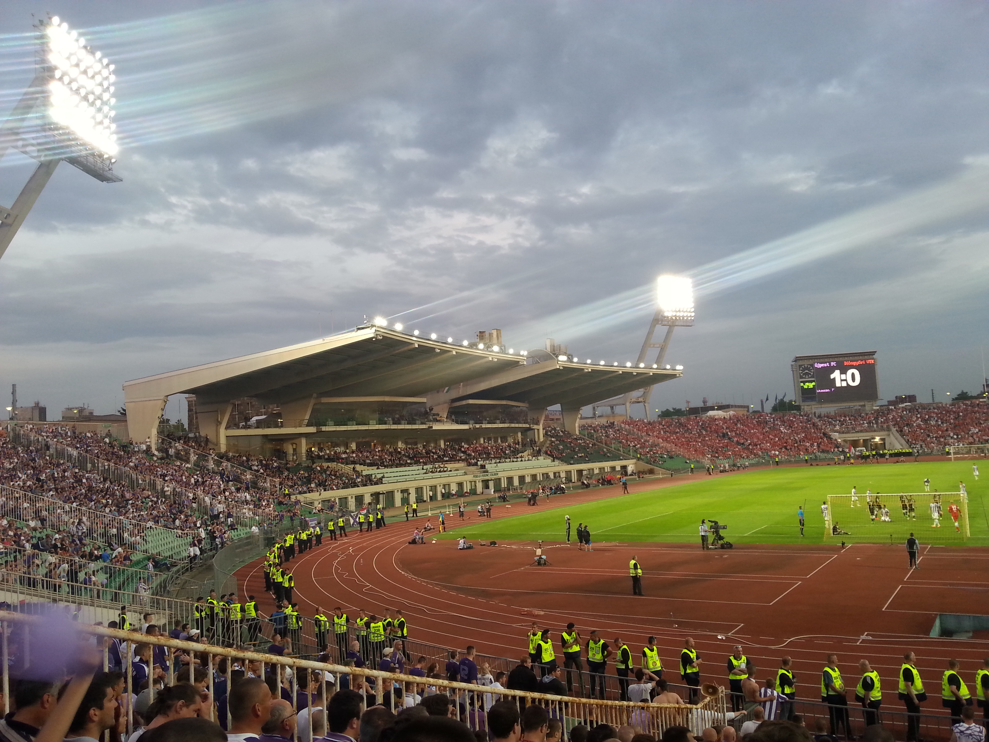 Magyar Kupa döntő3 2014.05.25 Újpest